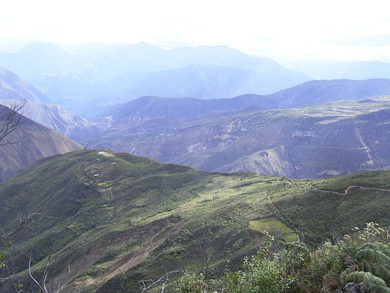 Valle cerca de Cocabamba, Luya, Amazonas, Peru